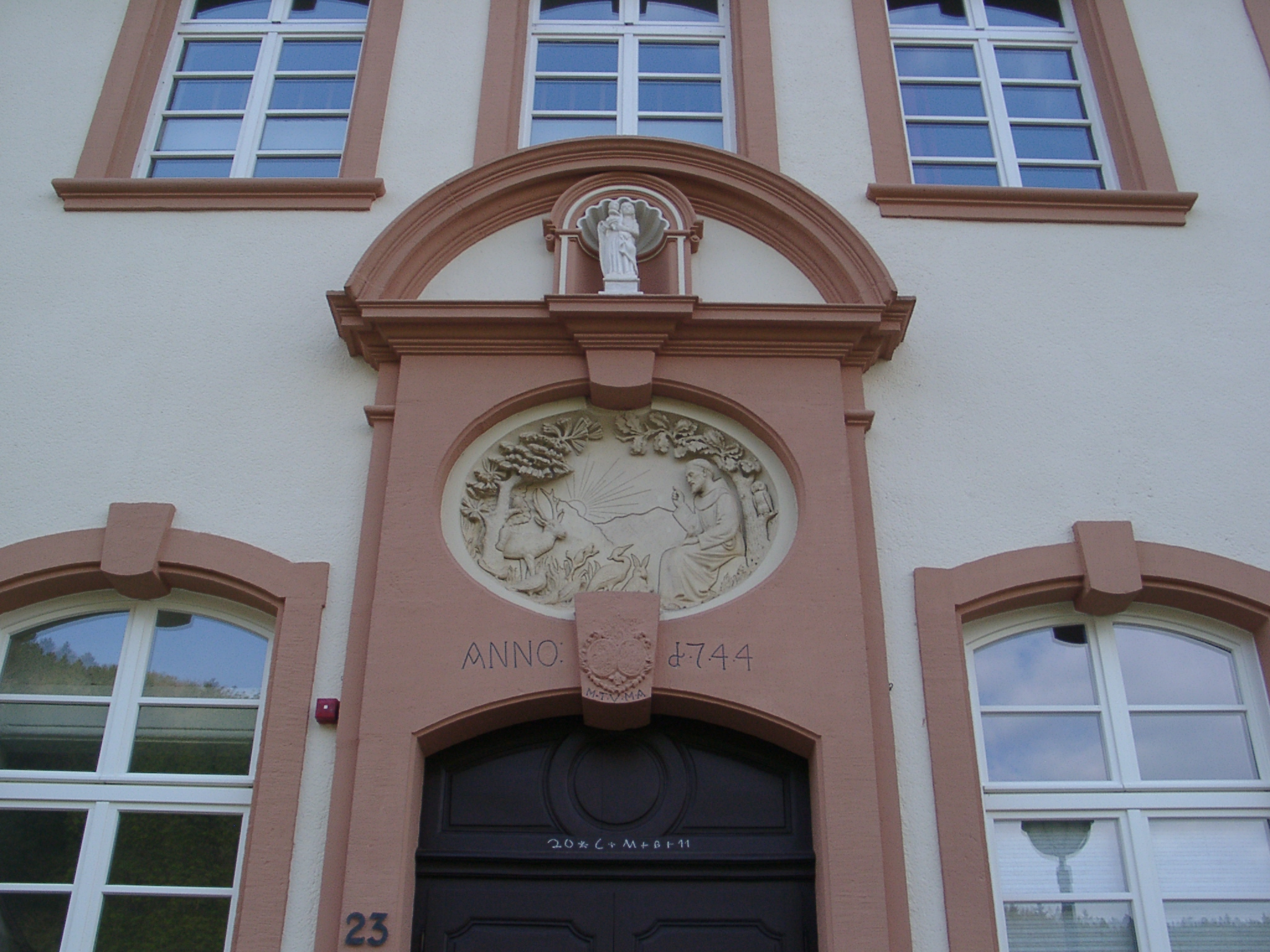 Sankt Thomas (Eifel)